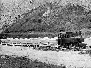 Train de wagonnets de gypse tracté par une locomotive vapeur Decauville